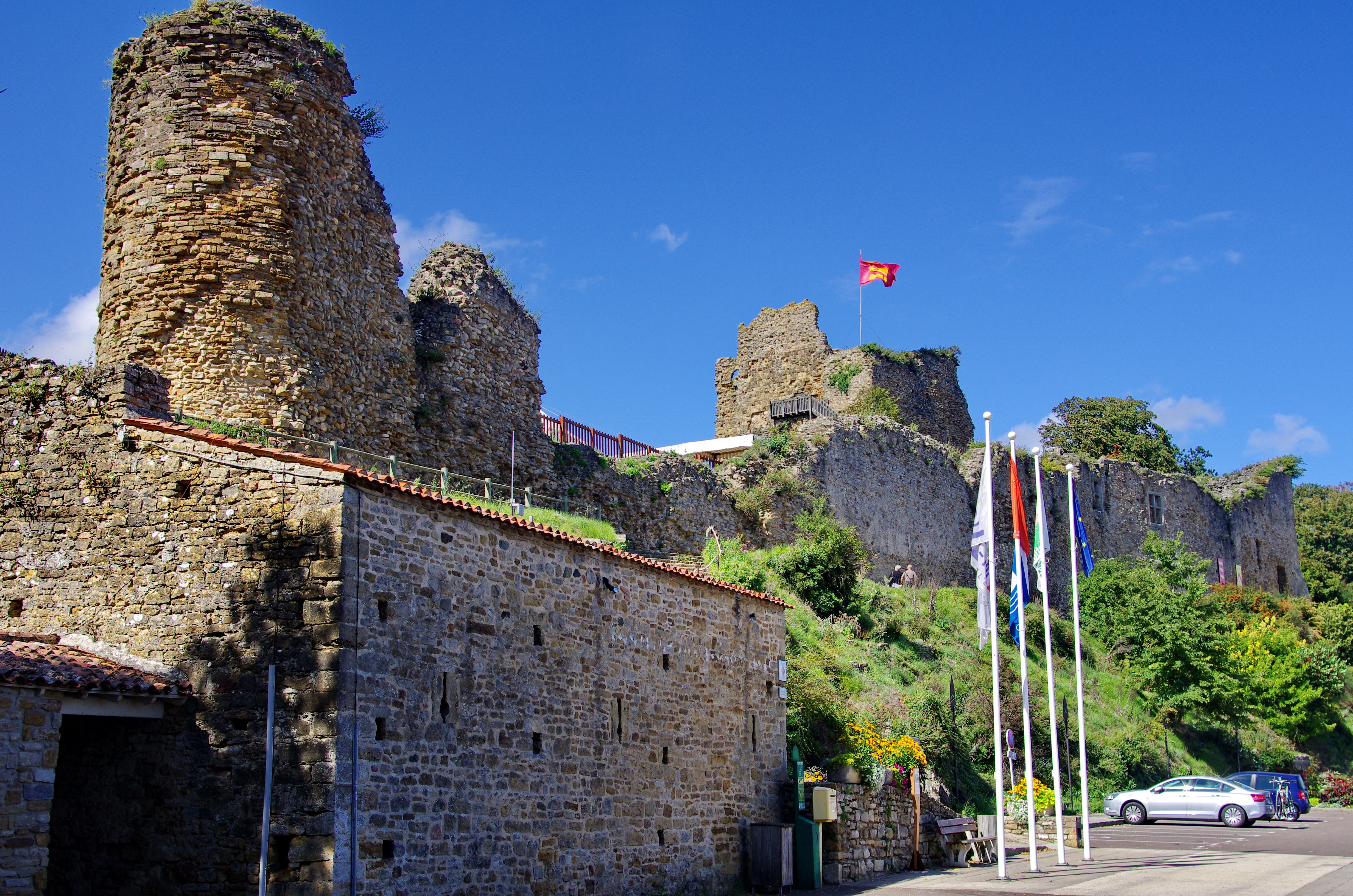 Le château de Talmont-Saint-Hilaire